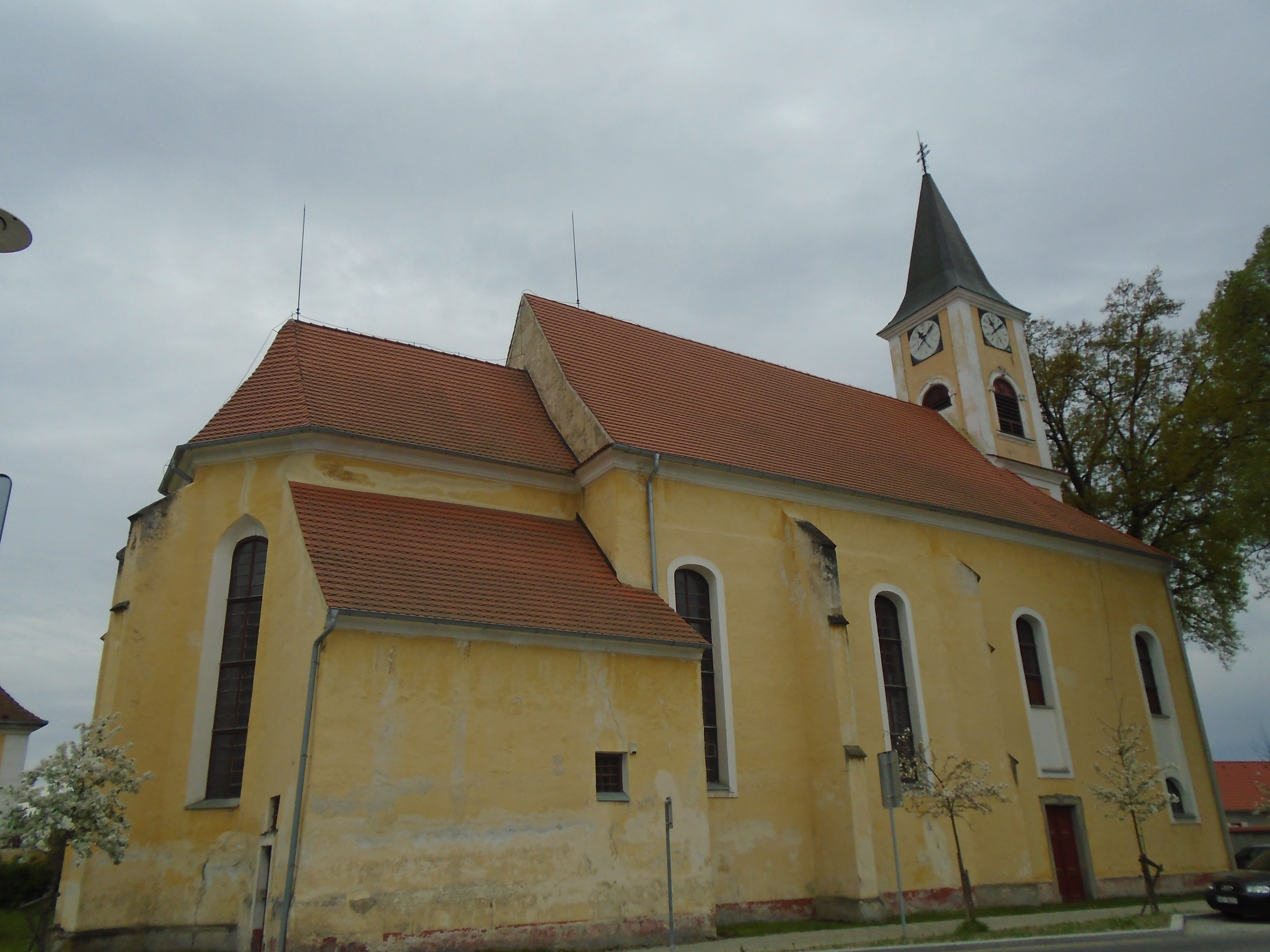 exteriér